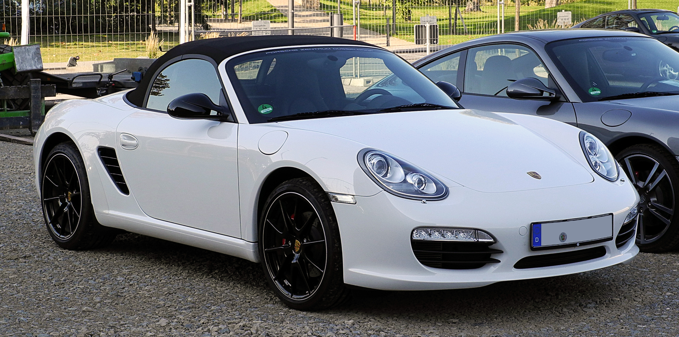 Porsche Boxster S (987, Facelift)